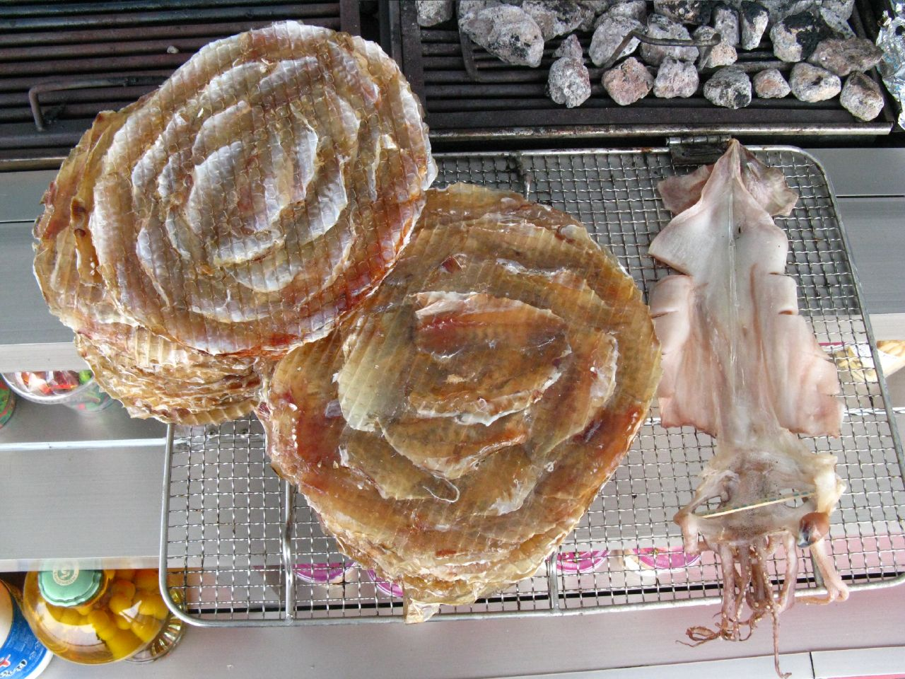 Gwipo and ojingeo gui